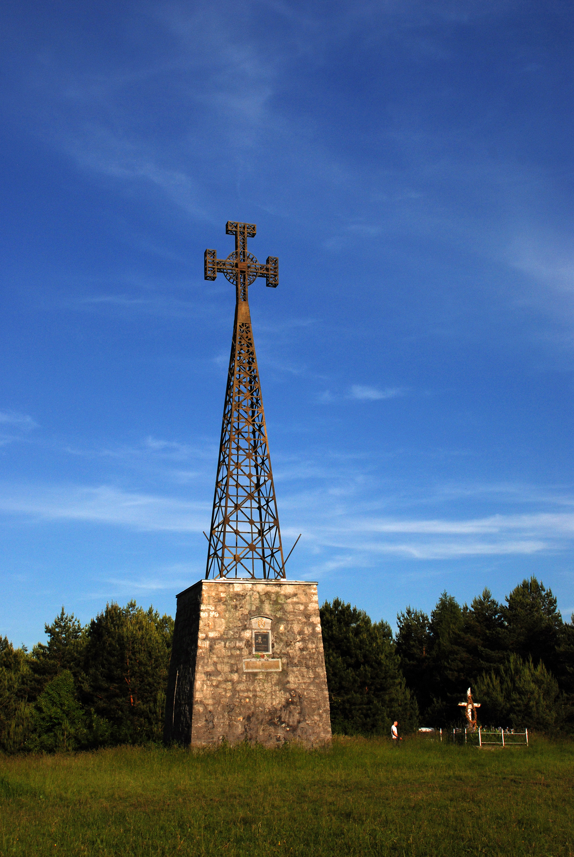 Пам'ятник Шашкевичу М. С., українському поету (ск. О.Лушпинський, 1911, залізо, камінь), Підлисся, східна околиця, «Біла гора»